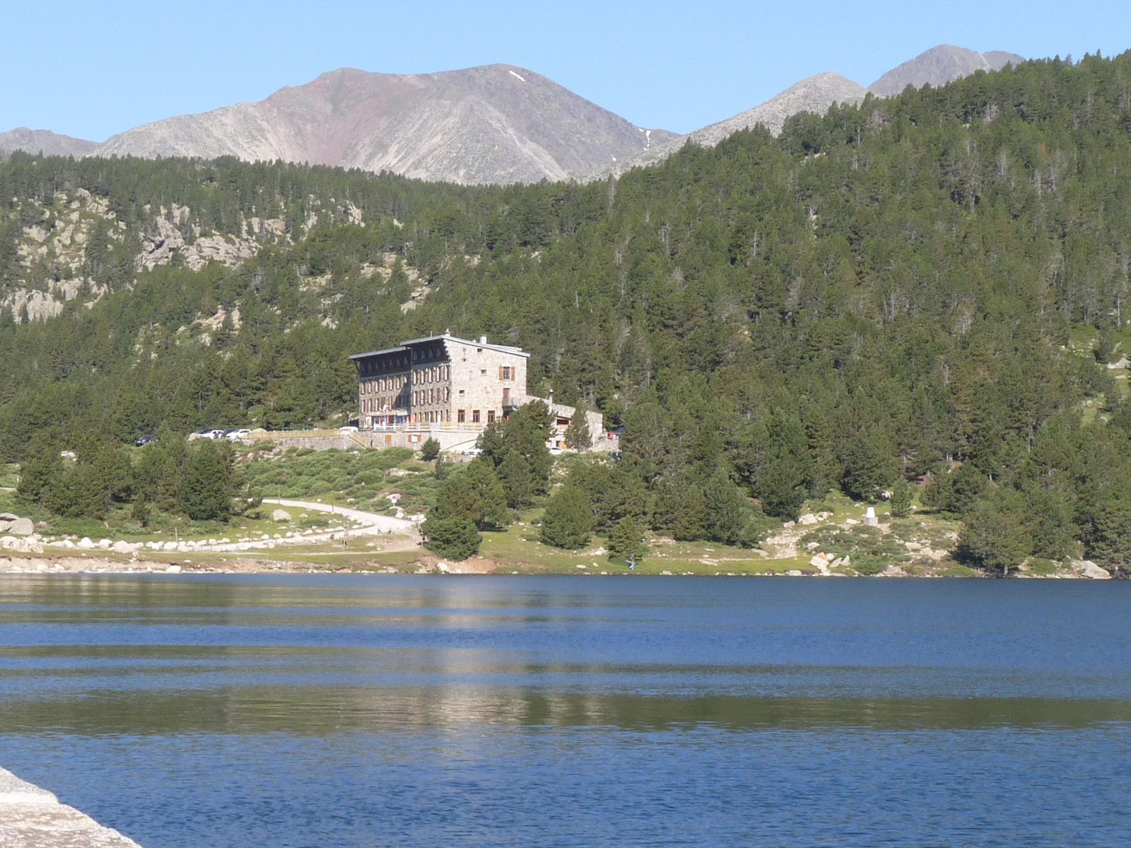 Lac des Bouillouses vu du barrage (hôtel Bones Hores et pic Carlit à l'extrême droite), Pyrénées-Orientales, France